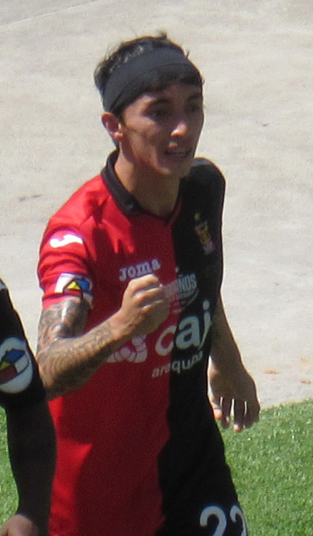 Omar Fernández con el FBC Melgar de Arequipa-Perú